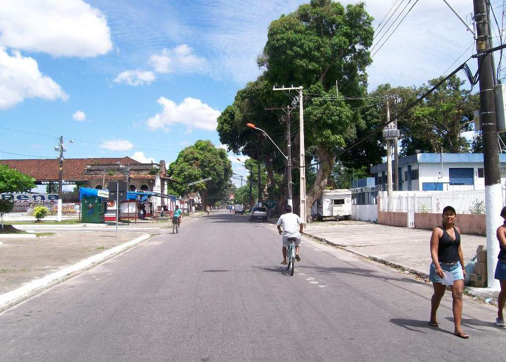 Rua Julio Maria. Icoaraci Pará, Brasil.